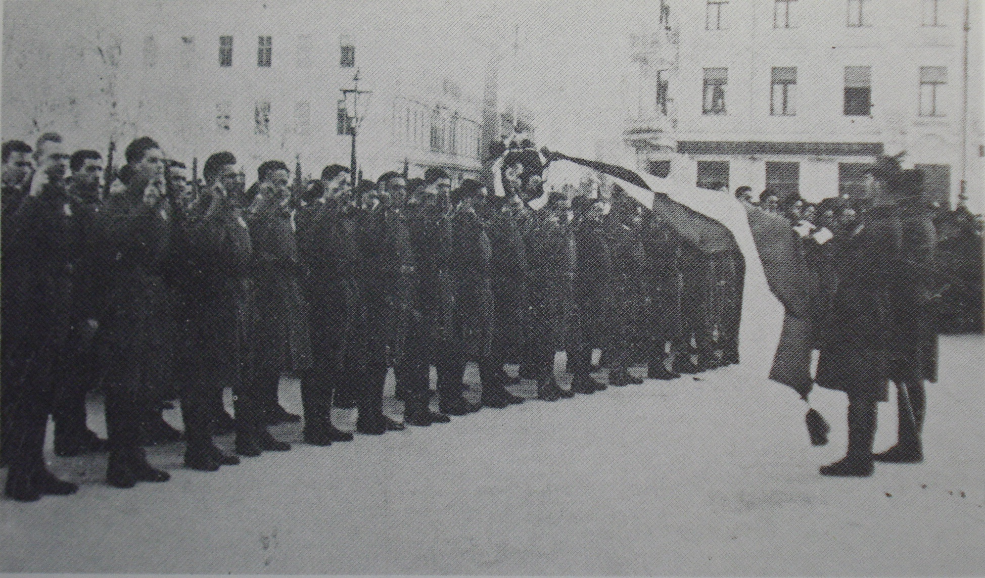 domobranska postrojba polaže prisegu Narodnom vijeću SHS, Zagreb, studeni 1918.